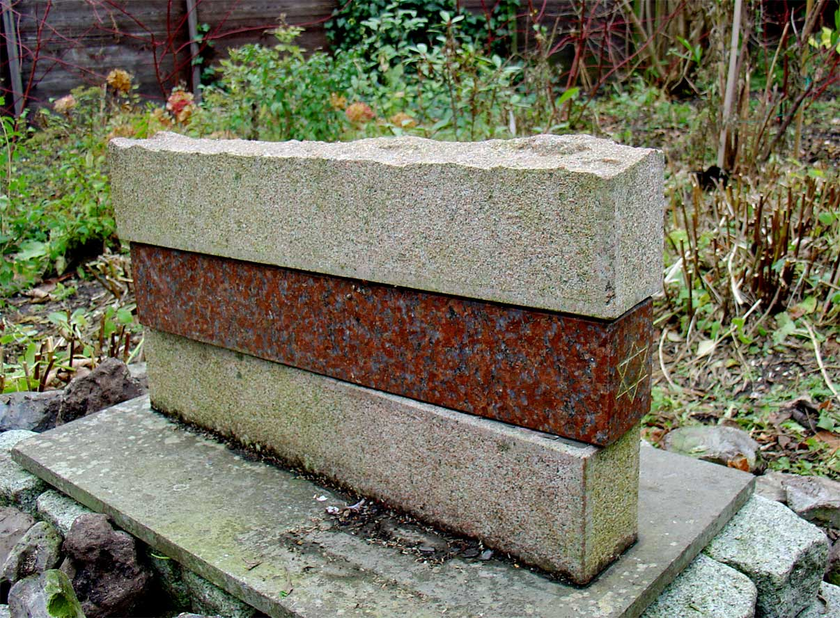 Replica van het Monument Joodse Alphense Vervolgingsslachtoffers (1988) door Dick Elffers geplaatst in de tuin van het Verzetsmuseum Gouda